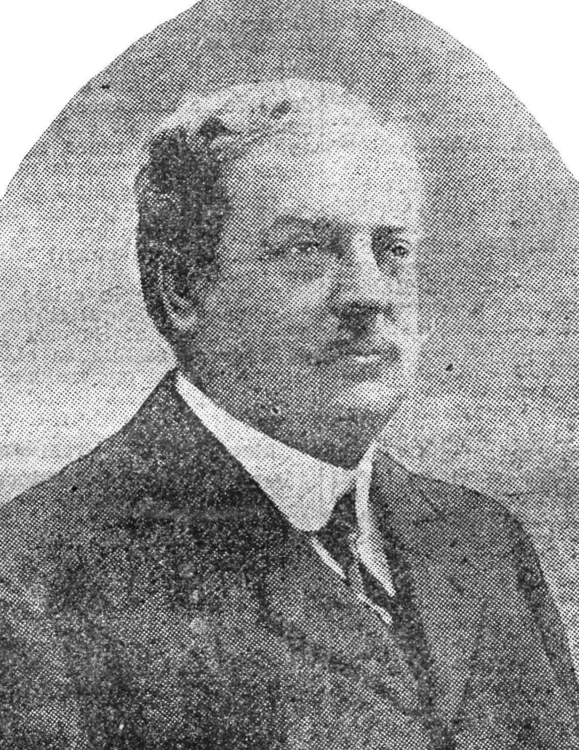 Émile Broussais.